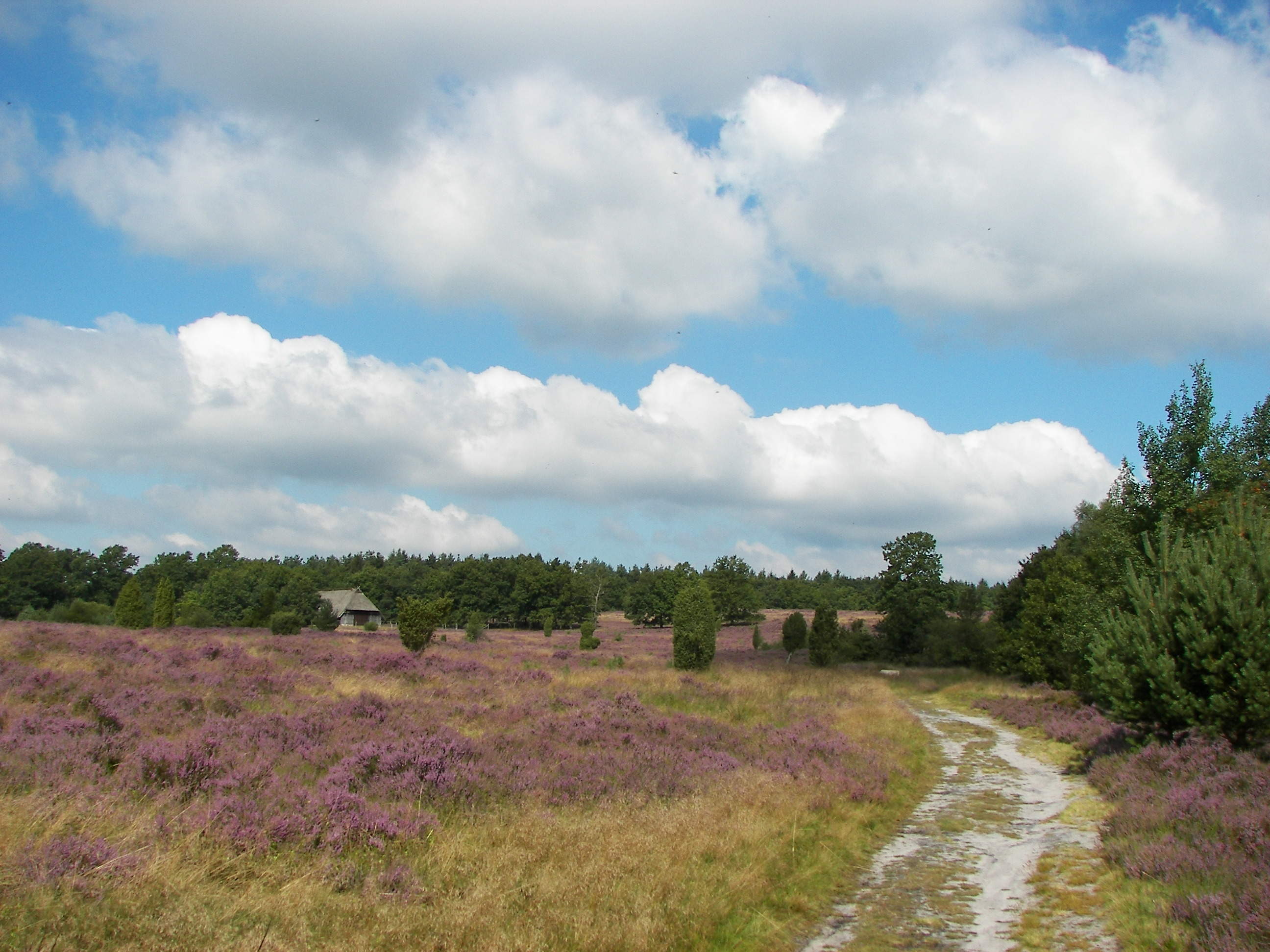 Lüneburger Heide bei Niederhaverbeck ("Heidetal")